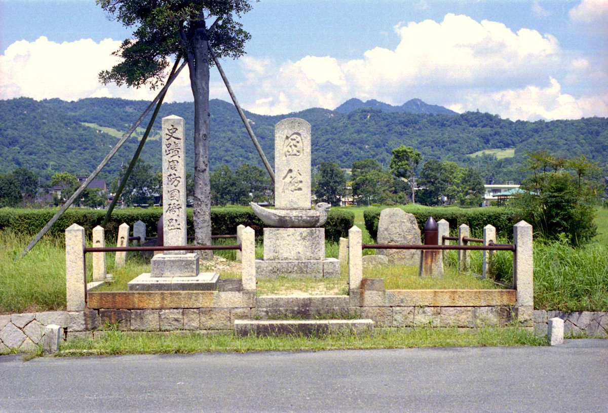 周防国衙跡